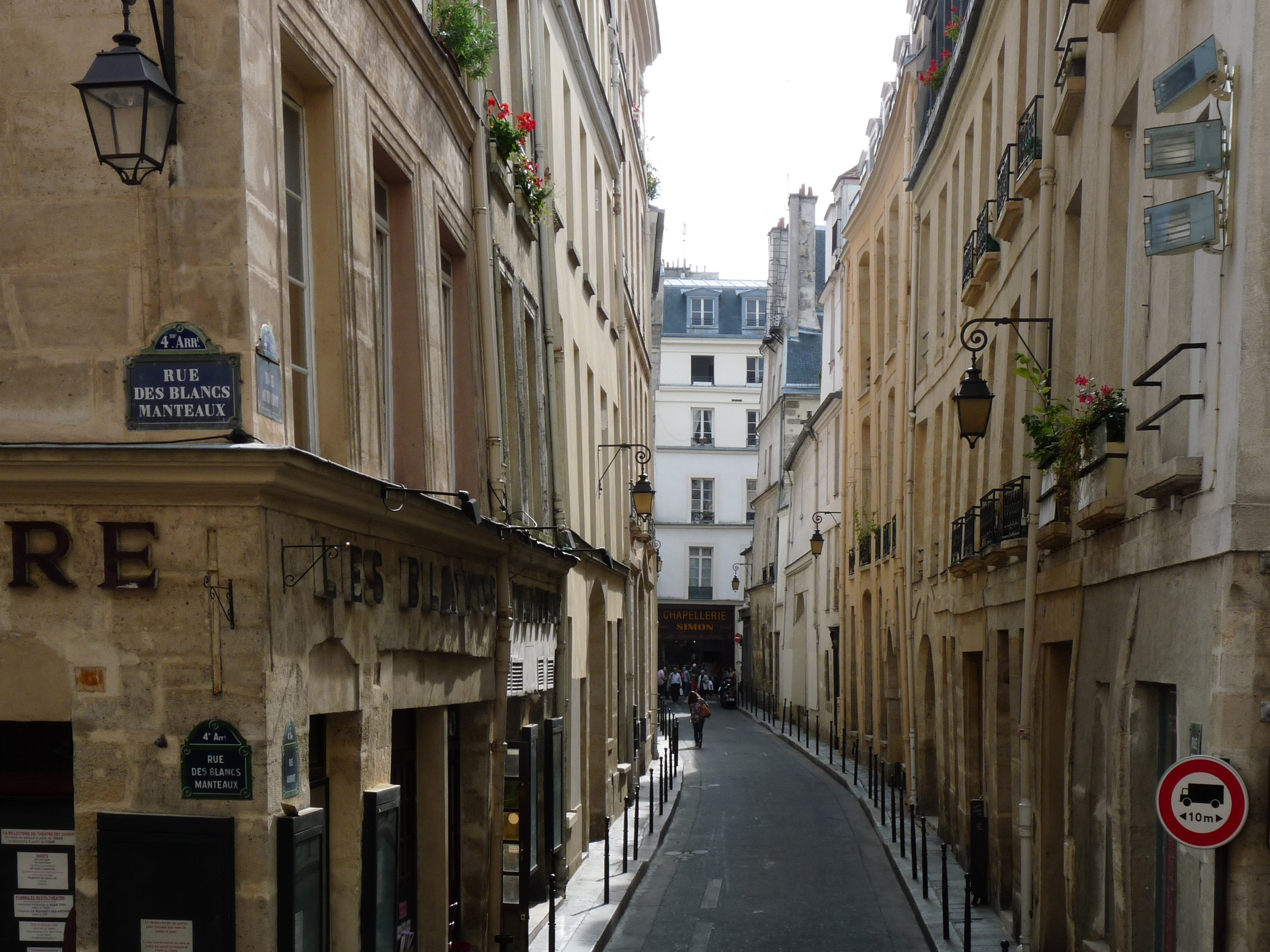 La rue Aubriot à Paris, vue des escaliers de l'église des Blancs Manteaux (rue des Blancs Manteaux). Au fond la rue Saint Croix de la Bretonnerie.